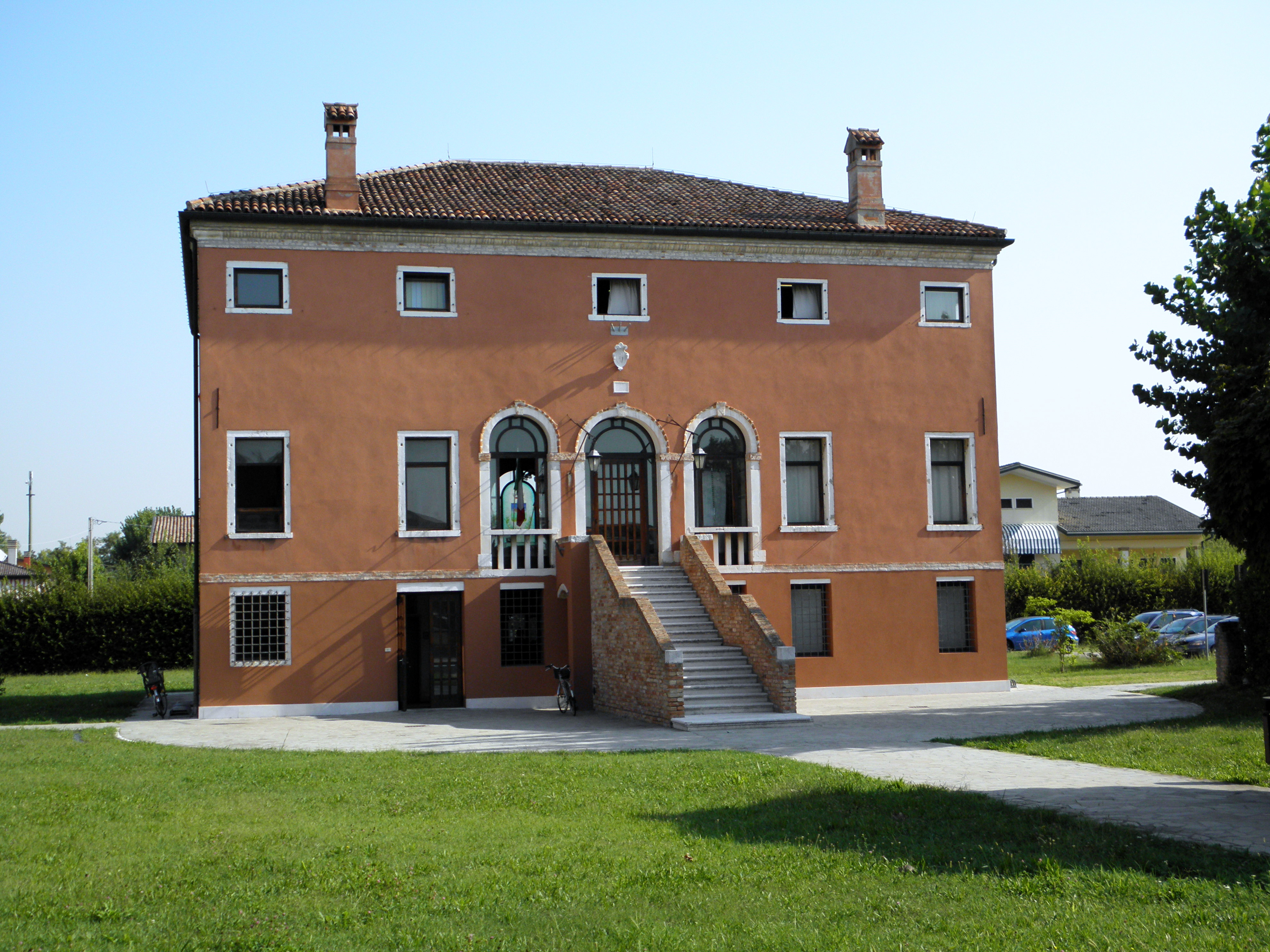 Campagna Lupia: Villa Colonda Marchesini, attuale sede municipale.